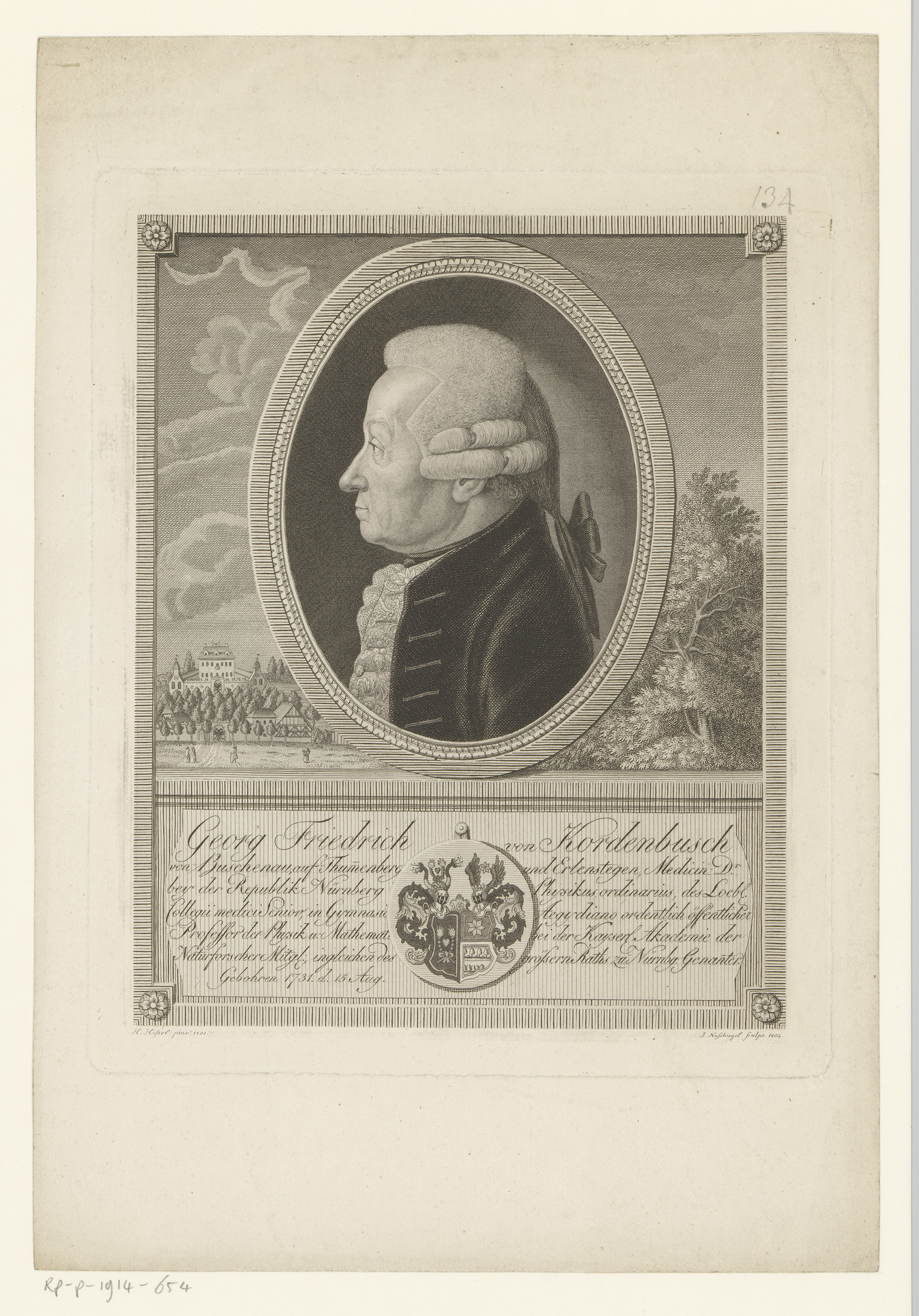 IdentificatieTitel(s): Portret van Georg Friedrich von KordenbuschObjecttype: prent Objectnummer: RP-P-1914-654Catalogusreferentie: HAB A 11447Opschriften / Merken: verzamelaarsmerk, verso, gestempeld: Lugt 2228VervaardigingVervaardiger: prentmaker: Johann Nusbiegel (vermeld op object)naar schilderij van: Leonhard Heinrich Hessell (vermeld op object)Datering: 1801 - 1829Fysieke kenmerken: gravure en etsMateriaal: papier Techniek: graveren (drukprocedé) / etsenAfmetingen: plaatrand: h 270 mm × b 222 mmOnderwerpWat: historical personsarmorial bearing, heraldryWie: Georg Friedrich KordenbuschVerwerving en rechtenVerwerving: aankoop 1905Copyright: Publiek domein